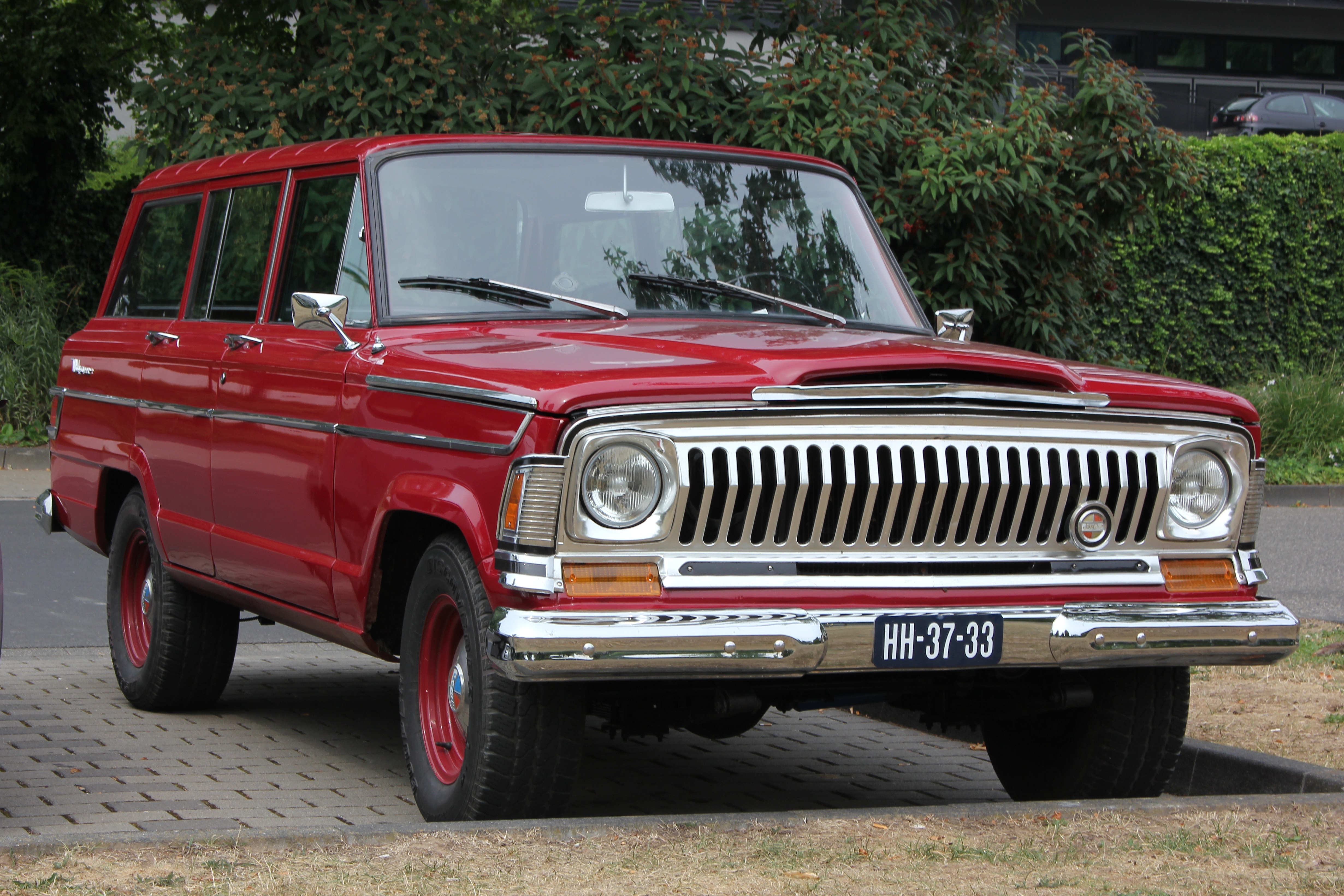 Kaiser-Jeep Wagoneer, Baujahr um 1967/68, wahlweise mit 6-Zylinder-Reihenmotor, 3802 cm³, oder 8-Zylinder-V-Motor, 5358 cm³ (Kennzeichen verändert)